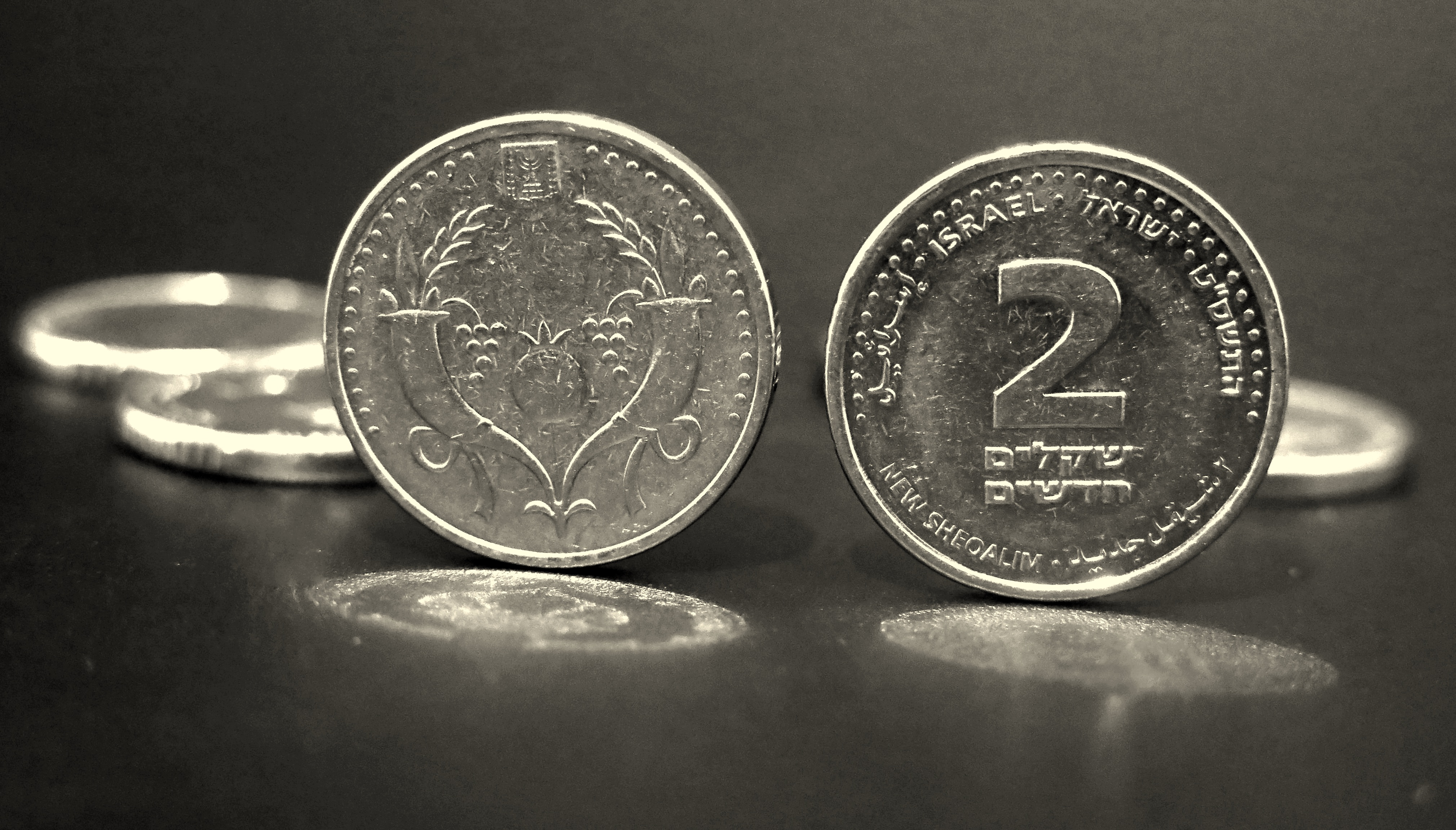 שני שקלים חדשים משני צדדיו